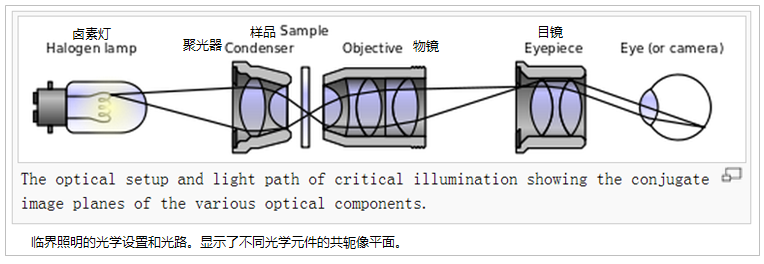 光源的像聚焦在样品平面上，因而会在样品像平面上出现。